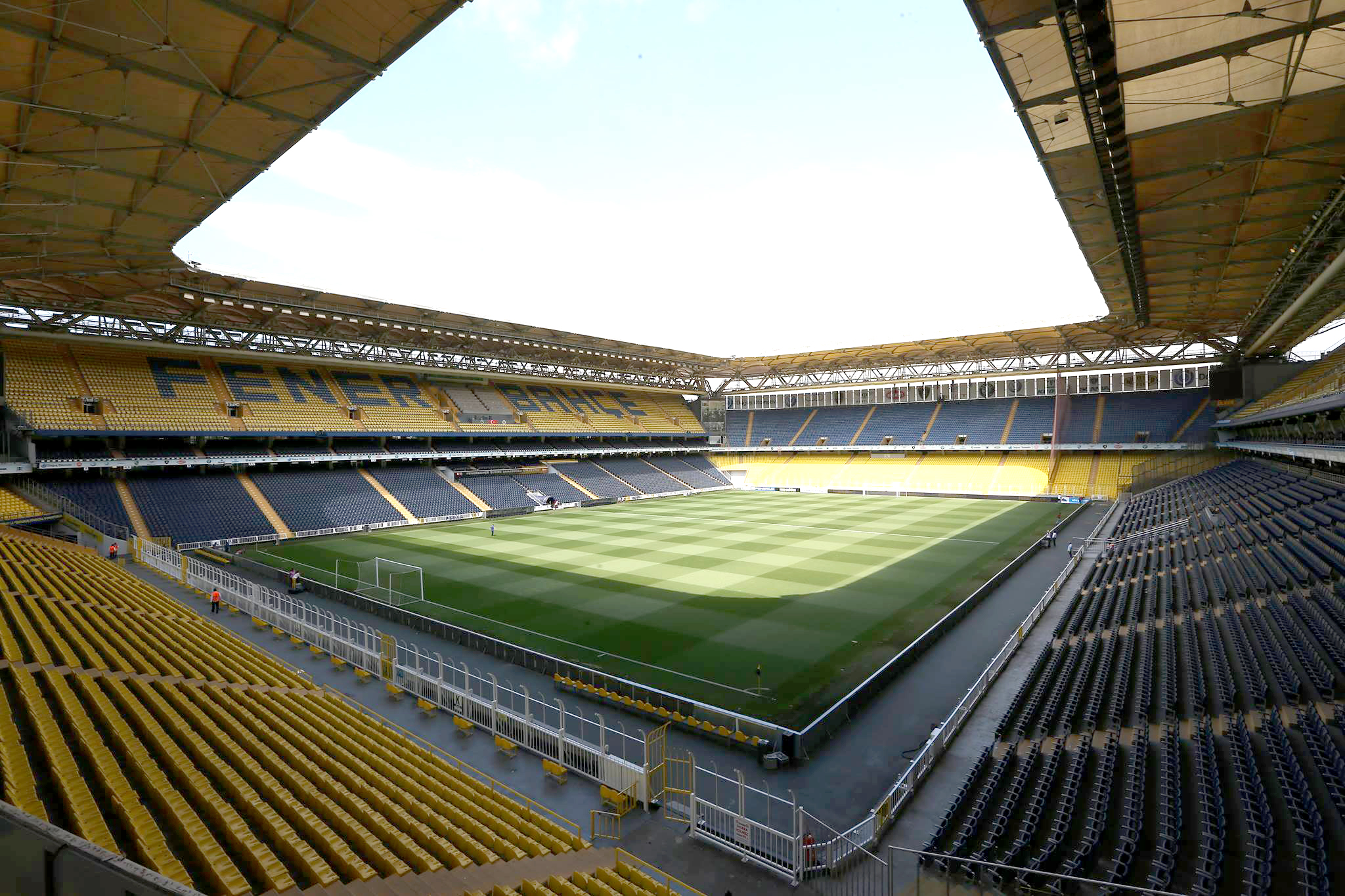 Fenerbahçe Şükrü Saracoğlu Stadyumu